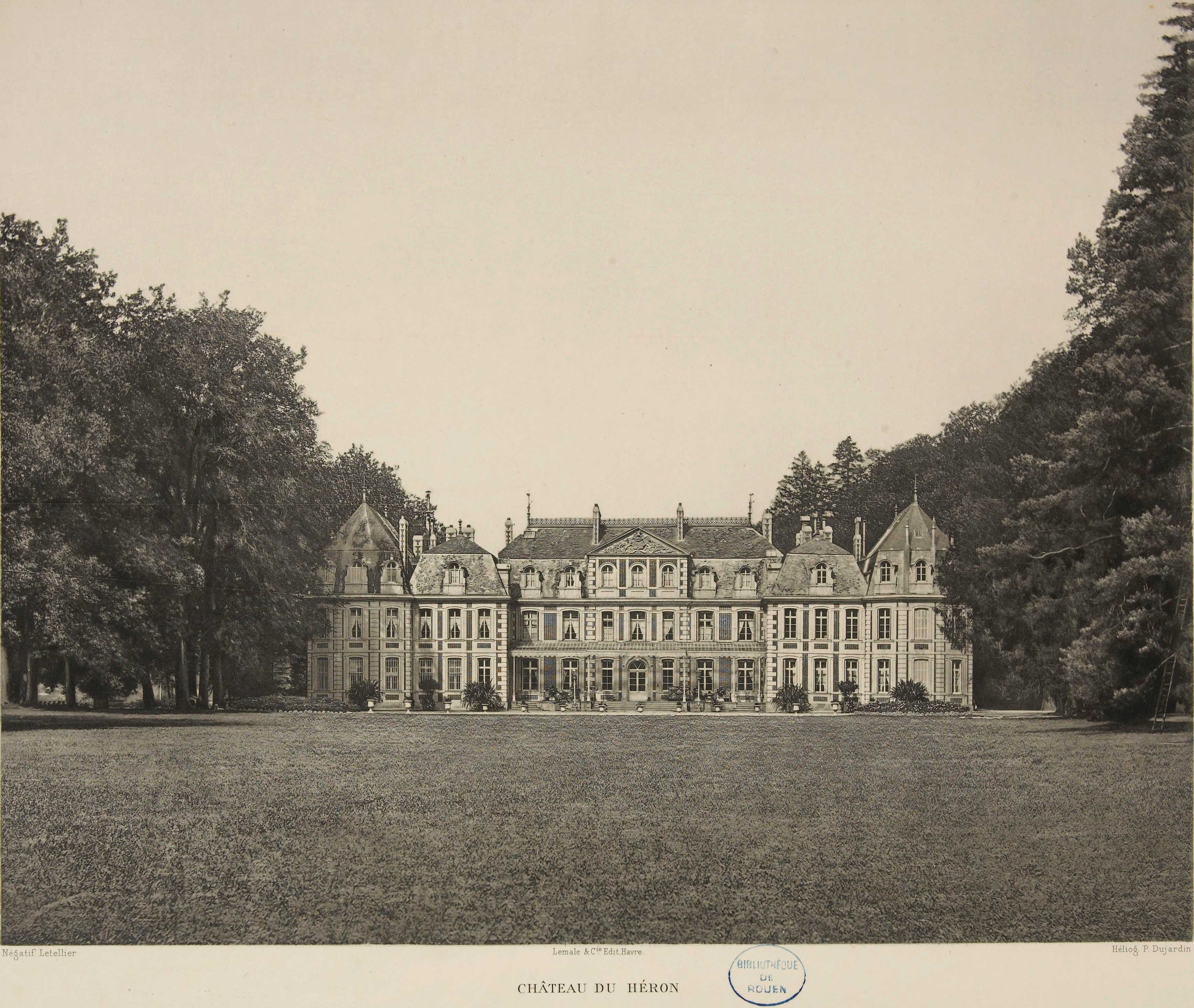 Château, Le Héron (76), détruit en 1948. Photographie d'Émile-André Letellier. Reproduction en héliogravure par Paul Dujardin pour La Normandie monumentale et pittoresque, édifices publics, églises, châteaux, manoirs, etc.,,. Tome I, Seine-Inférieure, planche 30. Éditions Lemasle et Cie, Le Havre, 1893 - Image 24,3 x 30,7 cm.